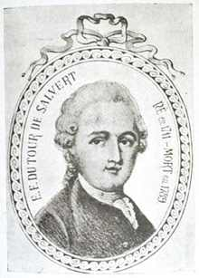 Etienne François Dutour de Salvert (1711-1789)